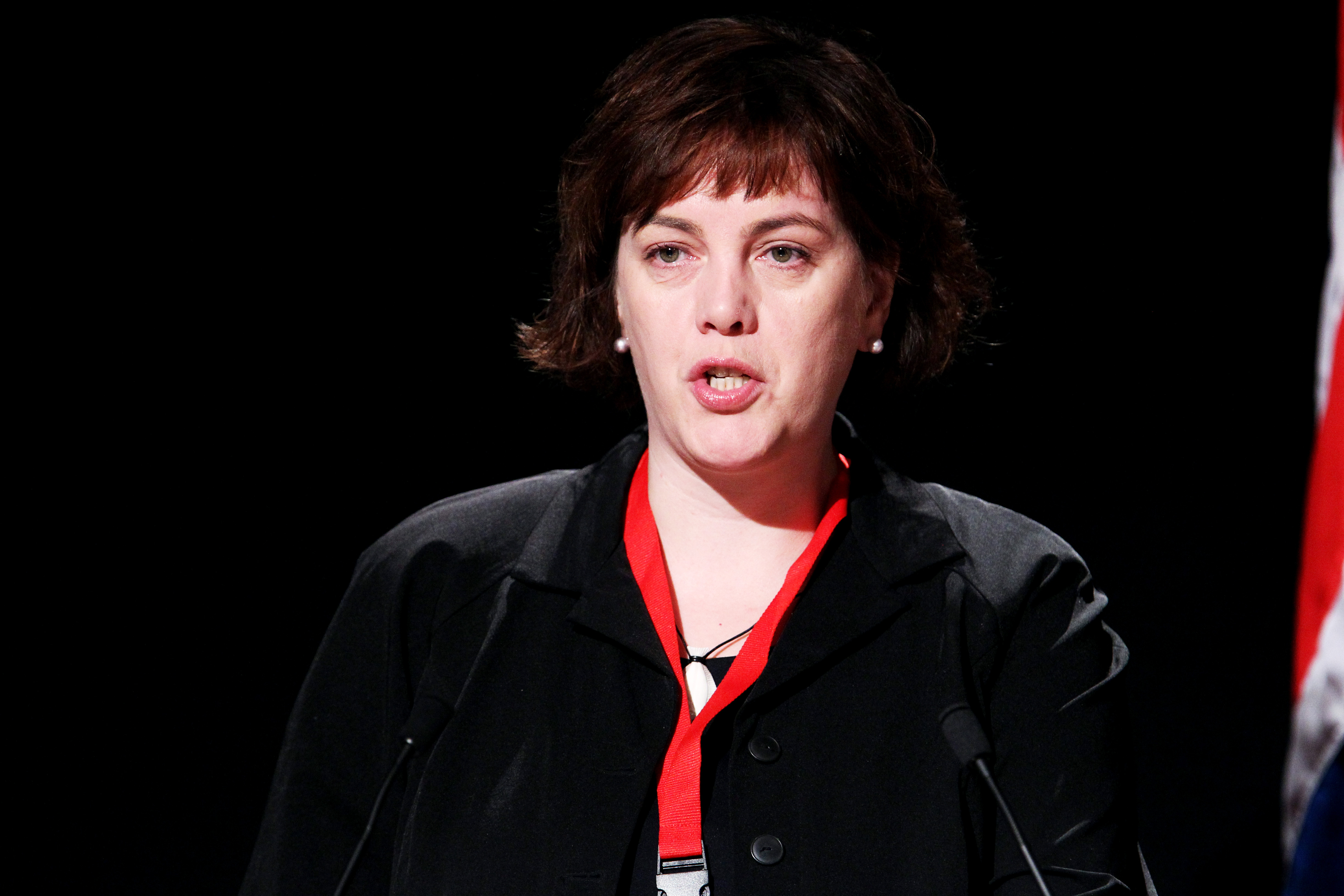 Islands miljöminister Svandís Svavarsdóttir vid Nordiska Rådets session på Island 2010-11-04.